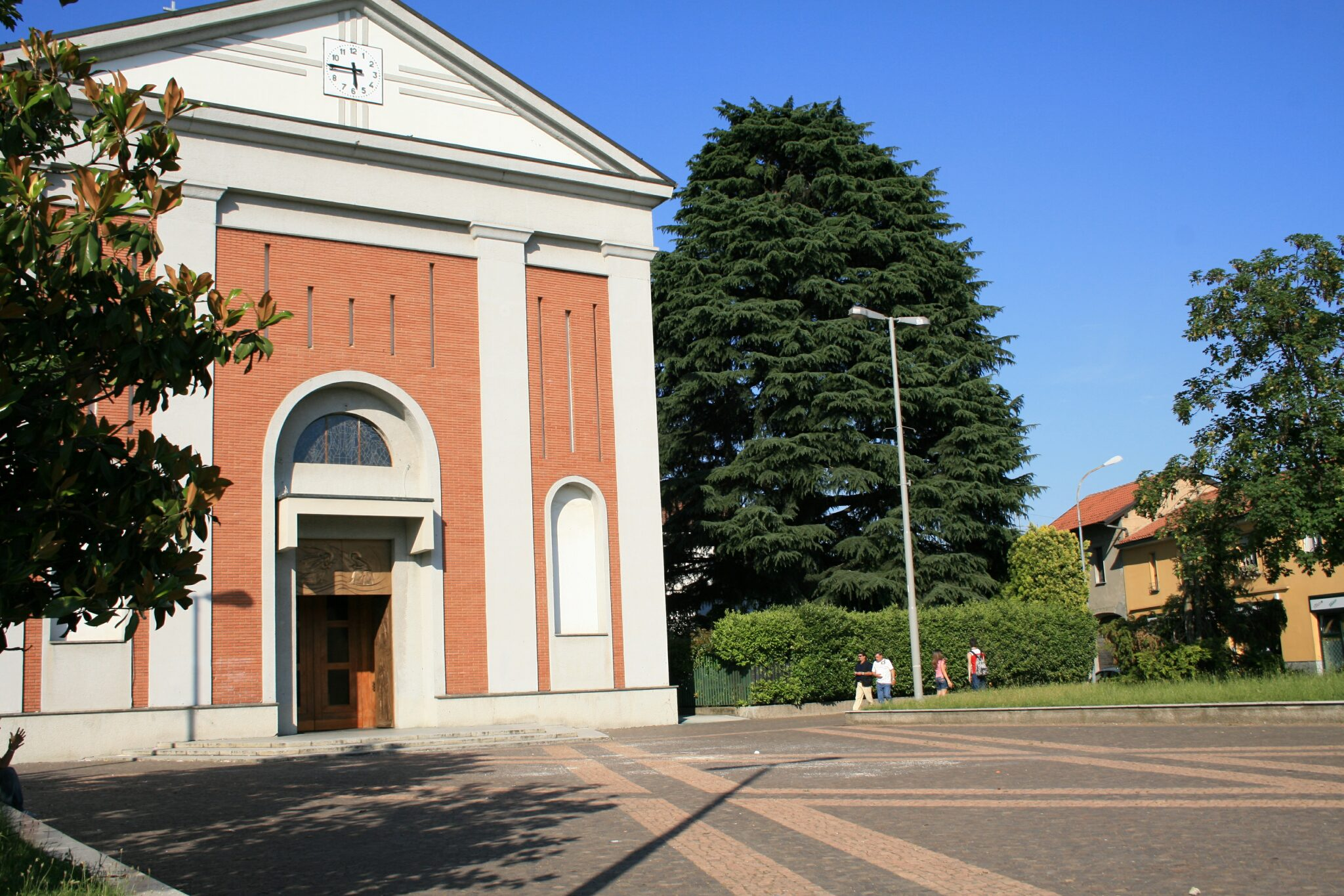 Barbaiana di Lainate - Piazza Vittoria